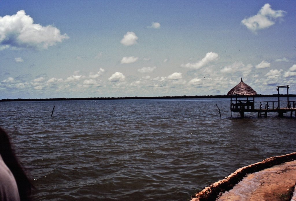 Im Tendaba Camp